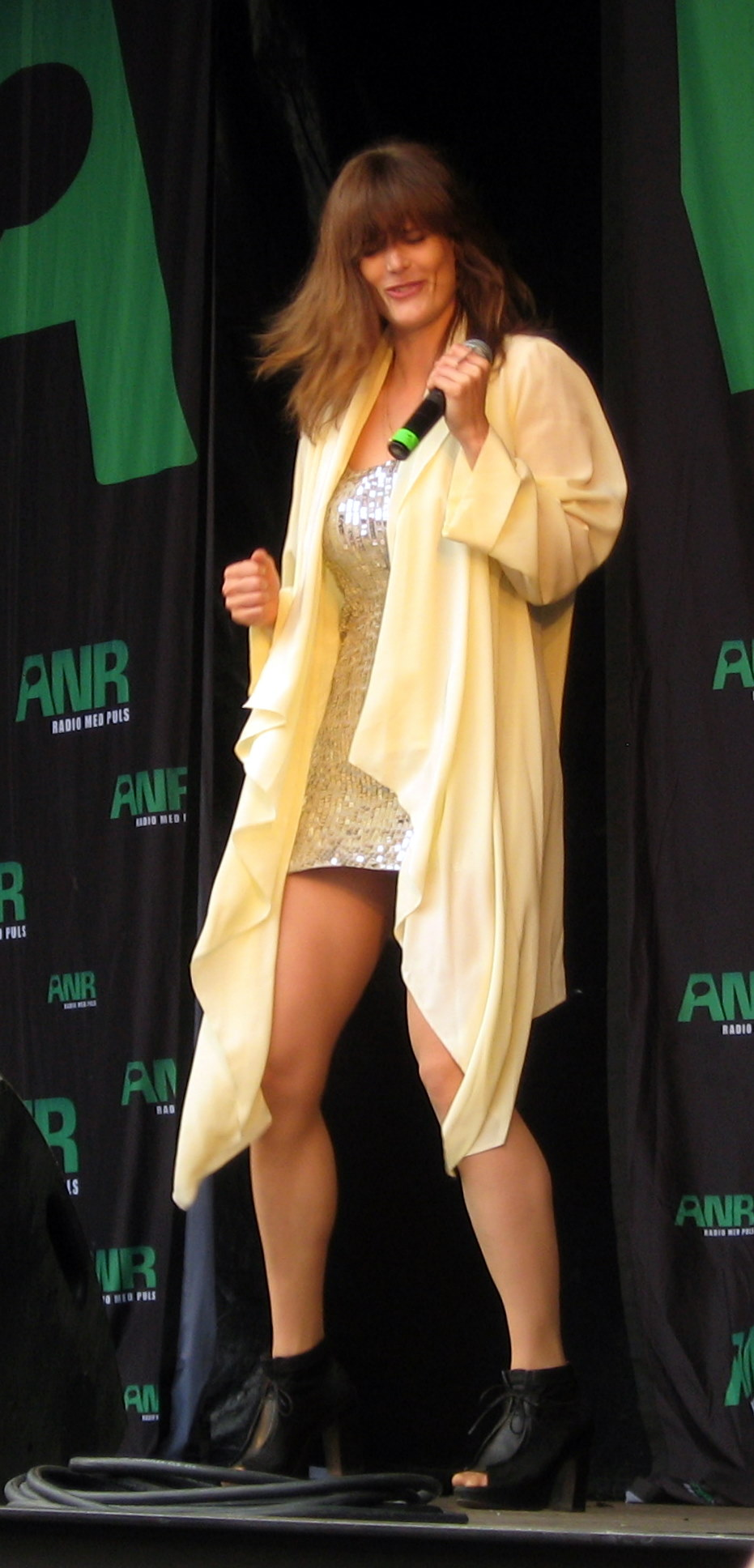 Clara Sofie i Hjørring, 2011